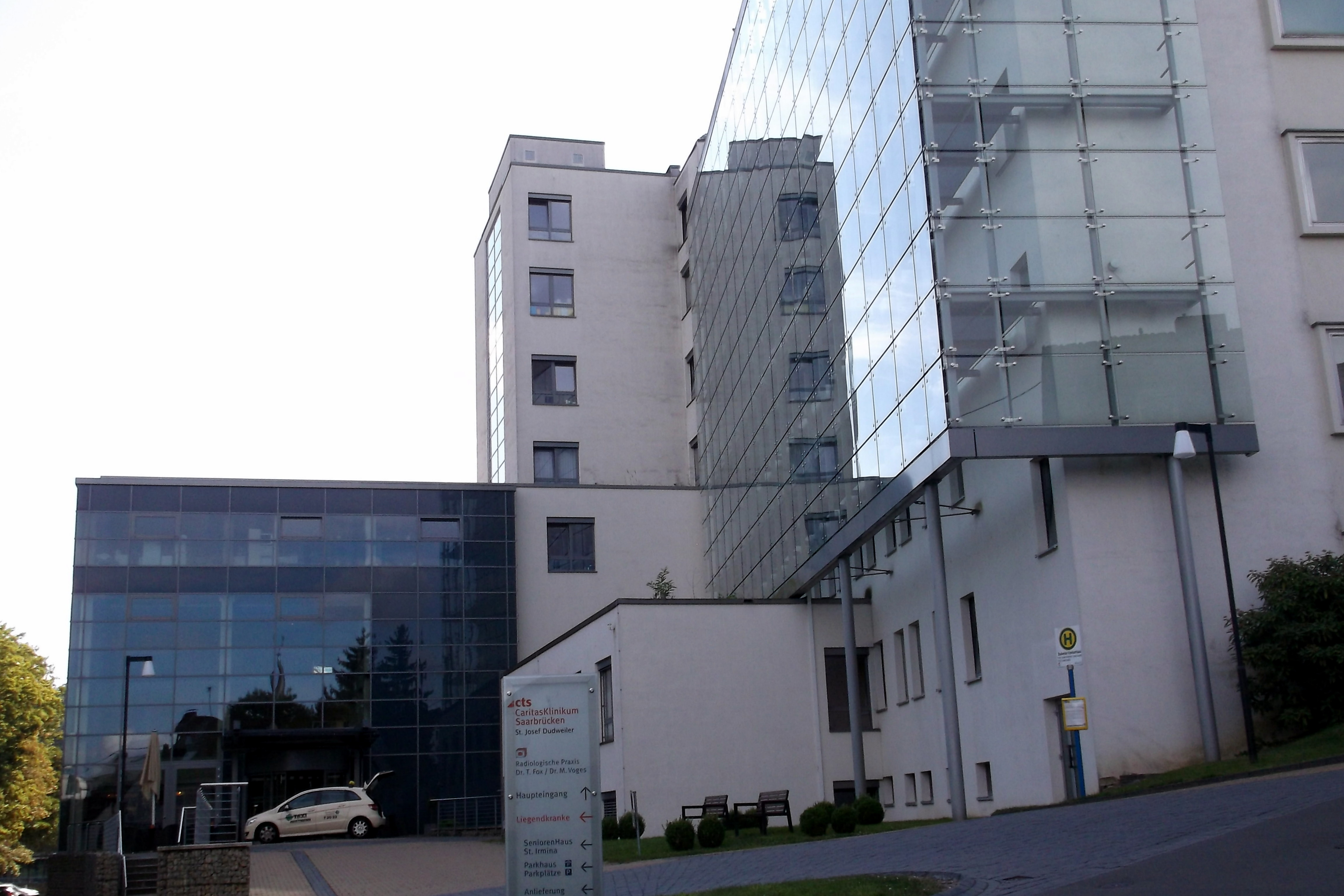 Das St. Josef Krankenhaus Dudweiler wurde 1899 von den Schwestern vom Heiligen Geist erbaut